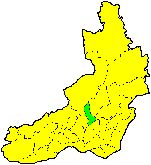 Нерчинский район на карте Забайкальского края